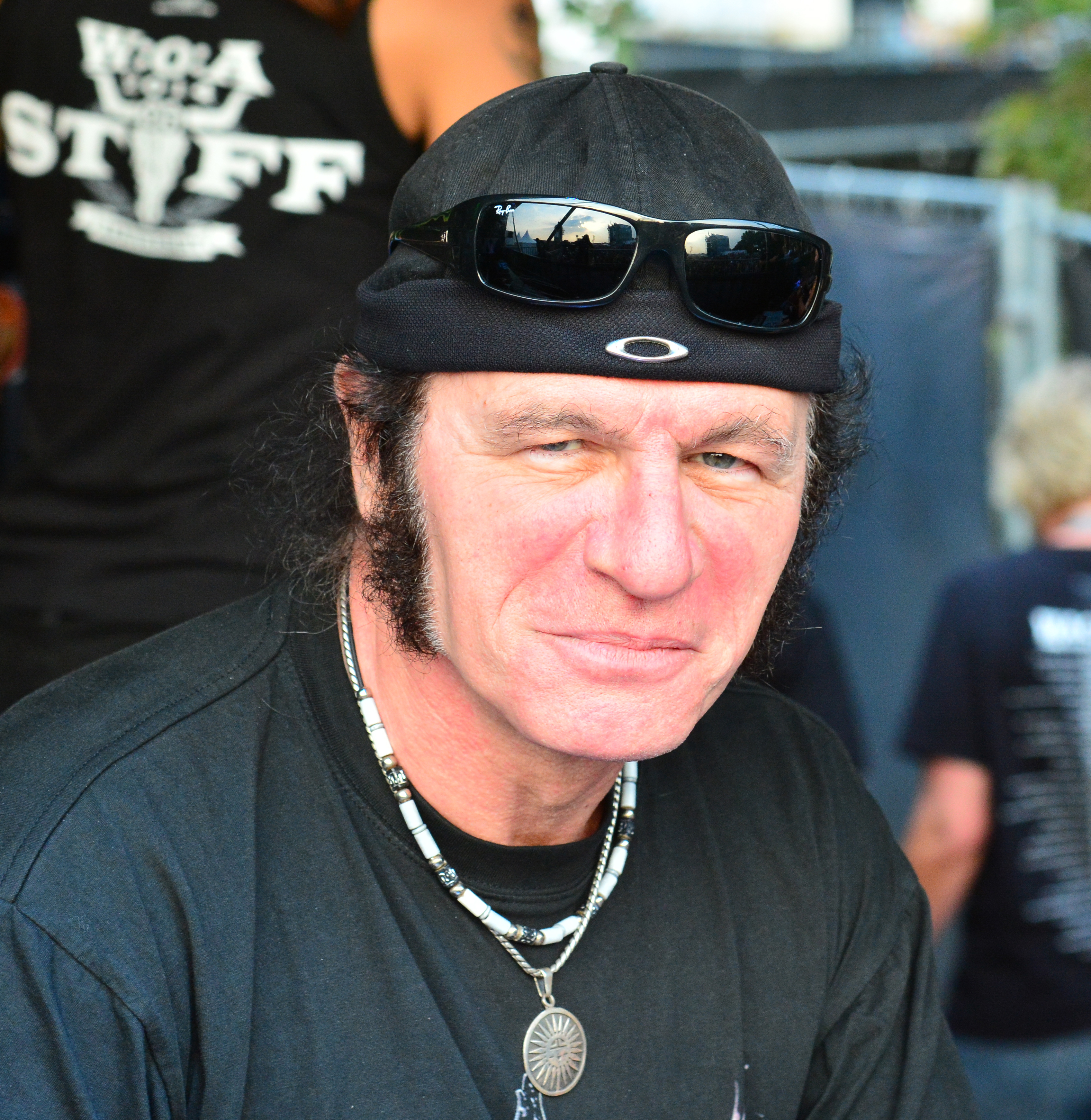 Herman Frank von Accept beim Meet & Greed auf dem Wacken Open Air 2014